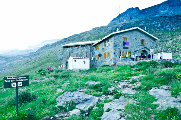 Refugio Góriz situado a 2200m en el parque natural de Ordesa